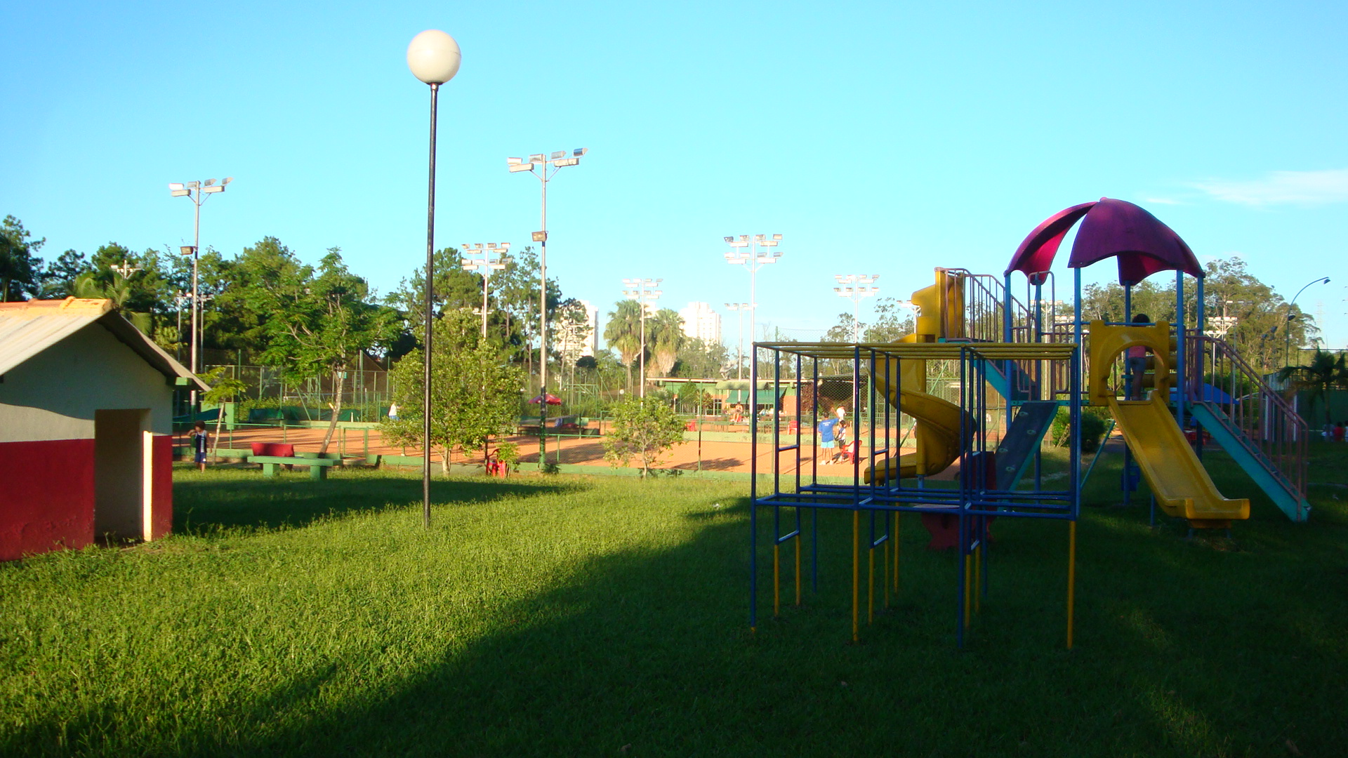 Parque do CFCSN